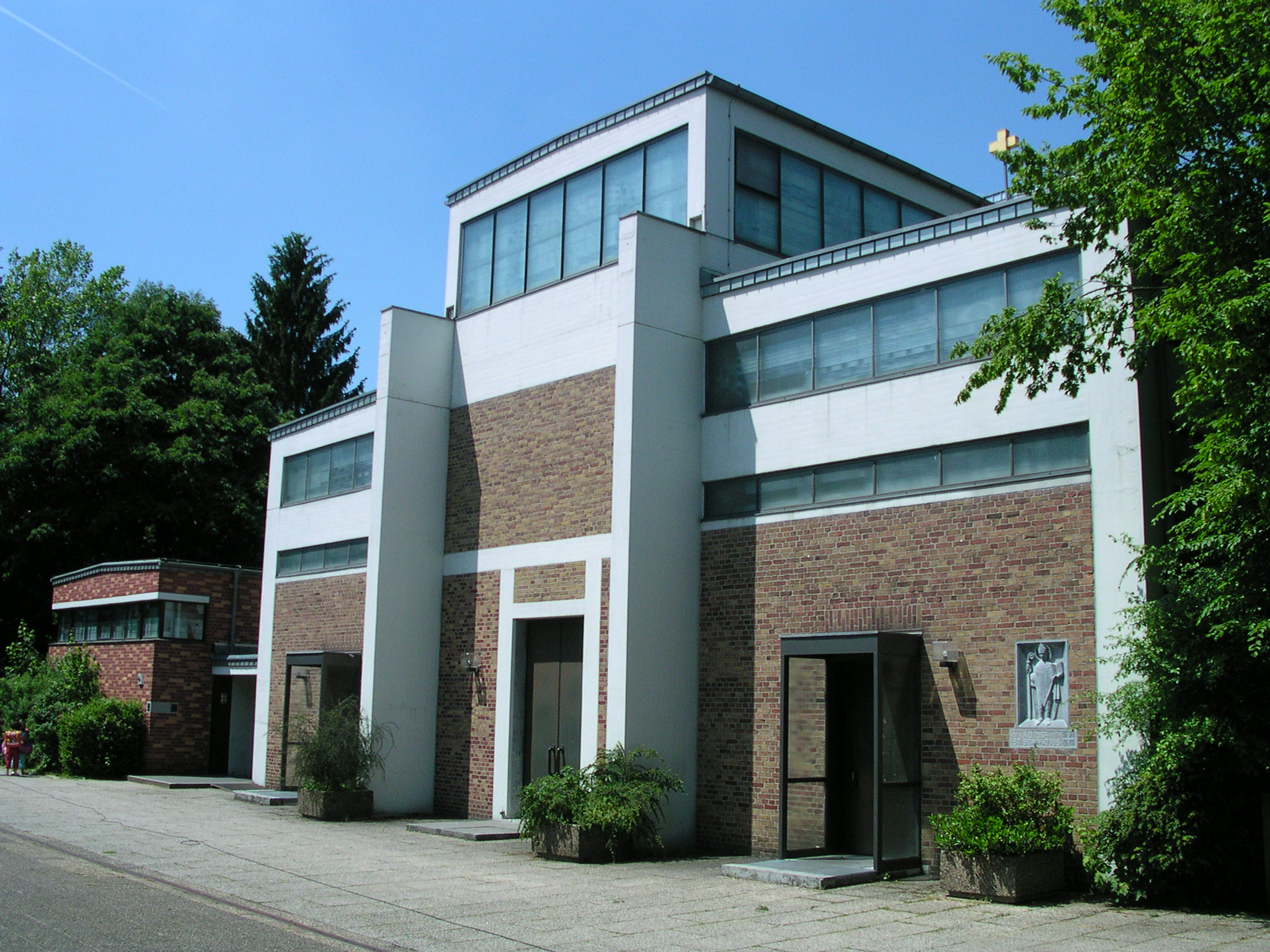 Aachen, Bonifatiuskirche